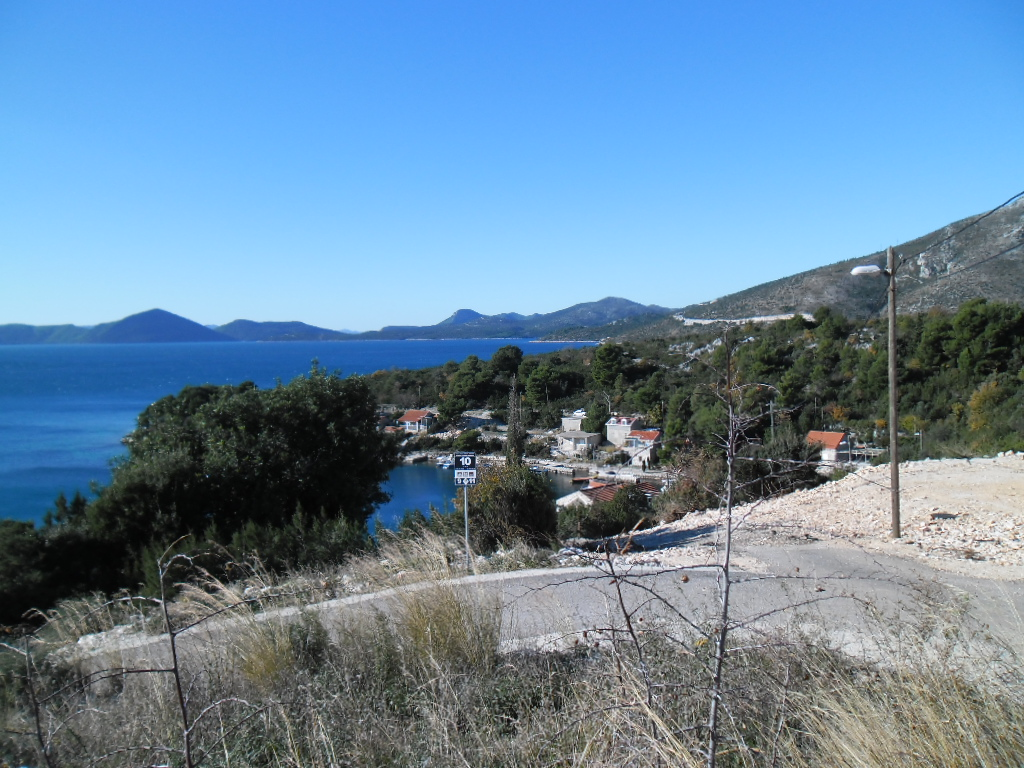 Jansko, Banići